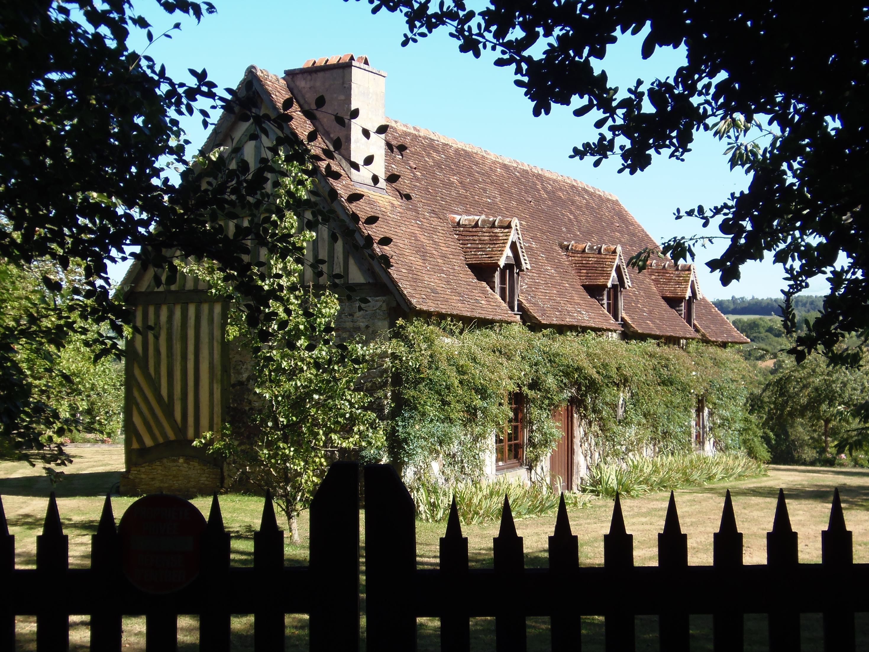 Les Champeaux (Normandie, France). La maison natale de Charlotte Corday.